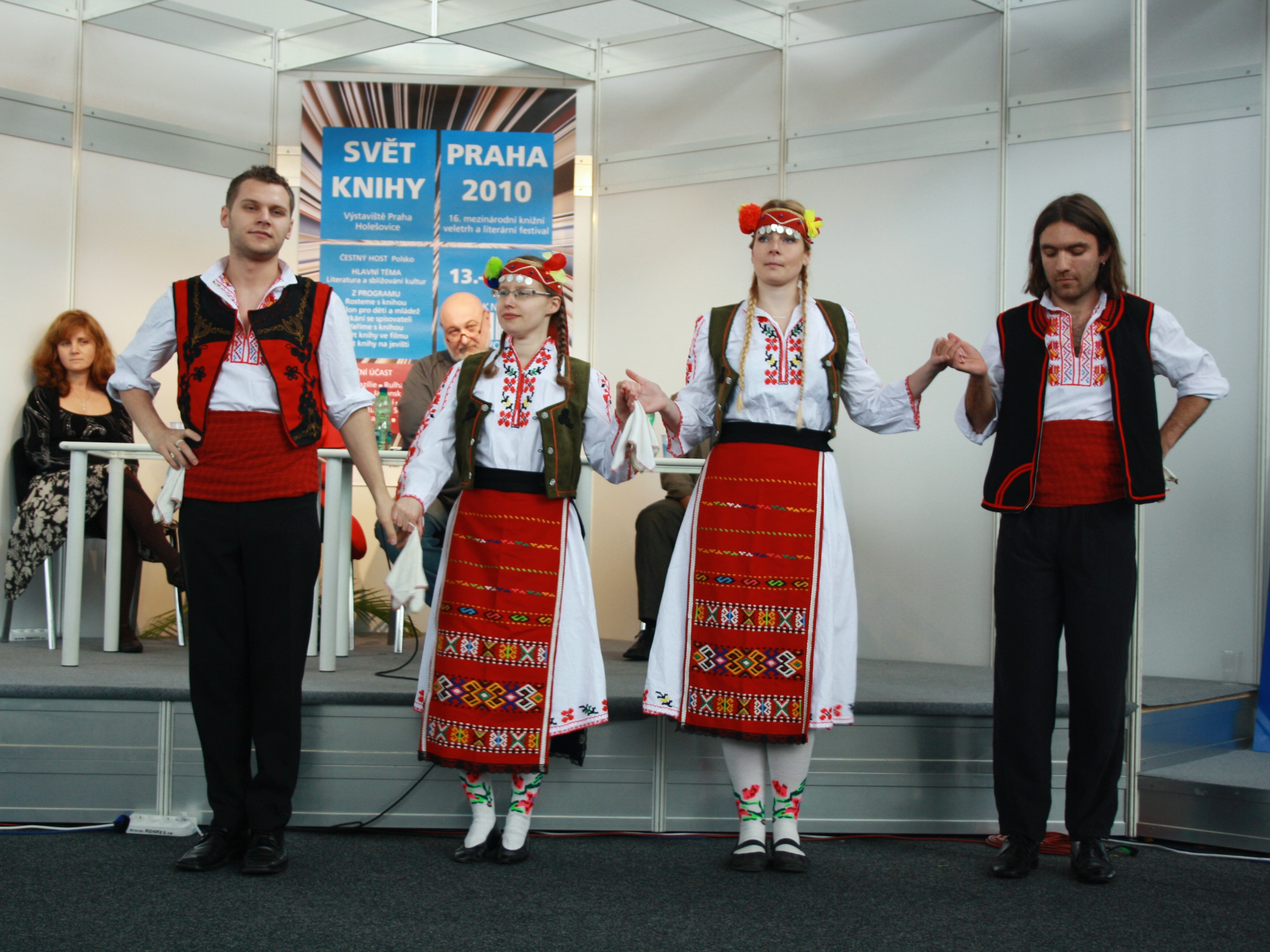 Vystoupení bulharského folklórního souboru na Světu knihy v rámci předávání ceny Premia Bohemica This photograph was taken with a DSLR from WMCZ's Camera grant. Personality rights warning Although this work is freely licensed or in the public domain, the person(s) shown may have rights that legally restrict certain re-uses unless those depicted consent to such uses. In these cases, a model release or other evidence of consent could protect you from infringement claims.